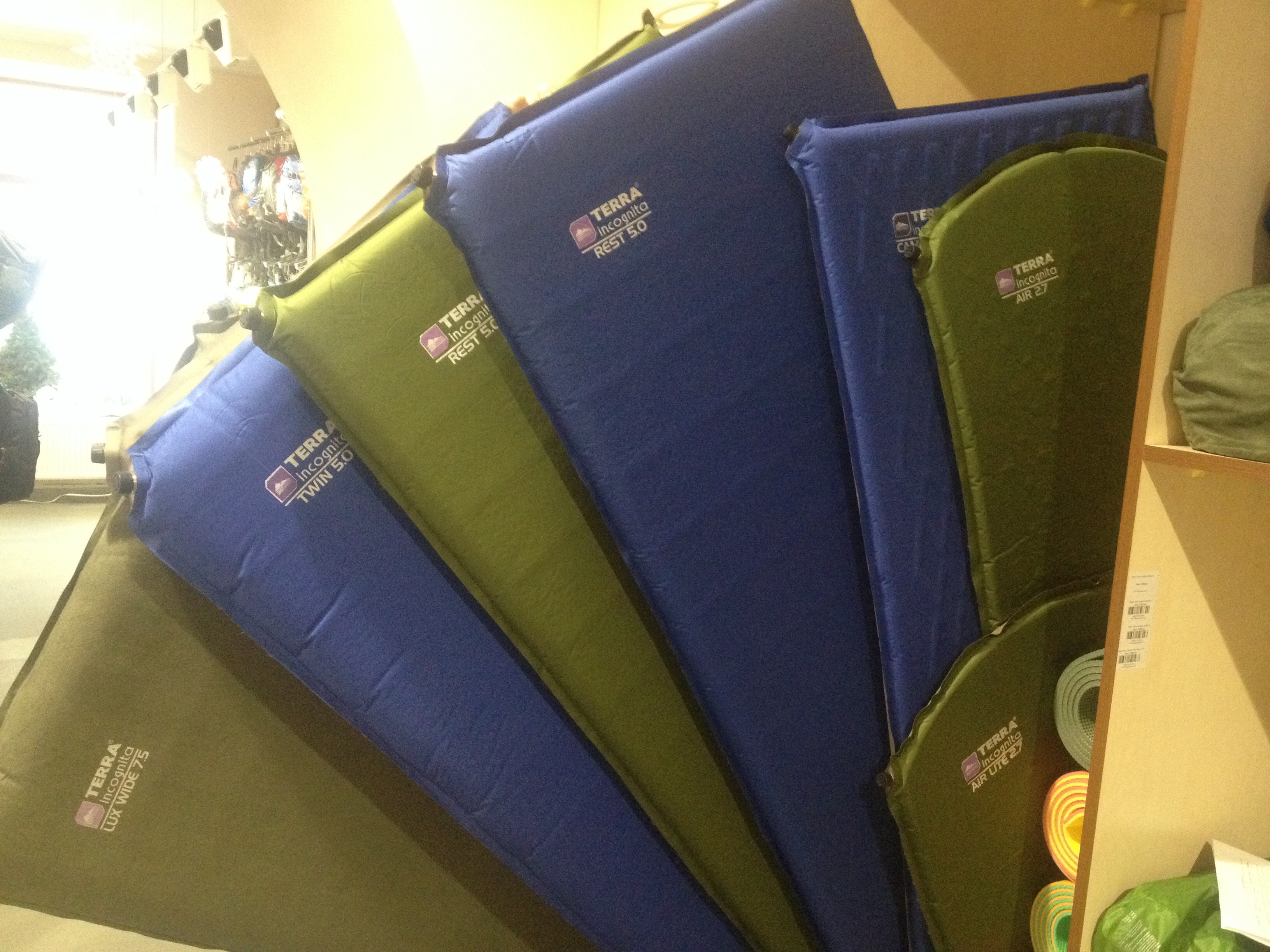 Каримат, туристичний килимок